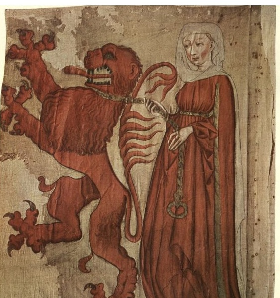 Flag of Frauenfeld. Historisches Museum, Frauenfeld